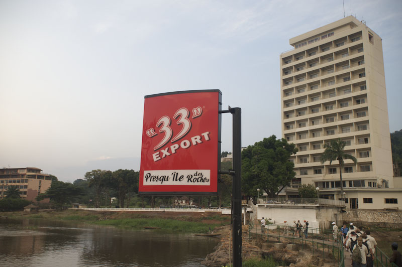 Qubangui Hotel mit 13 Stockwerken in Bangui, Hauptstadt der Zentralafrikanische Republik